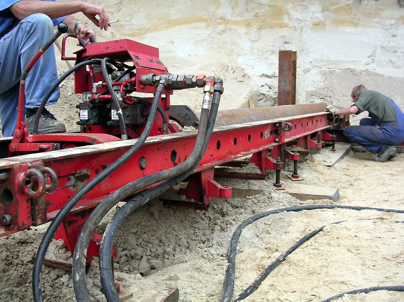 Vorrichtung zum Bohrpressen_03